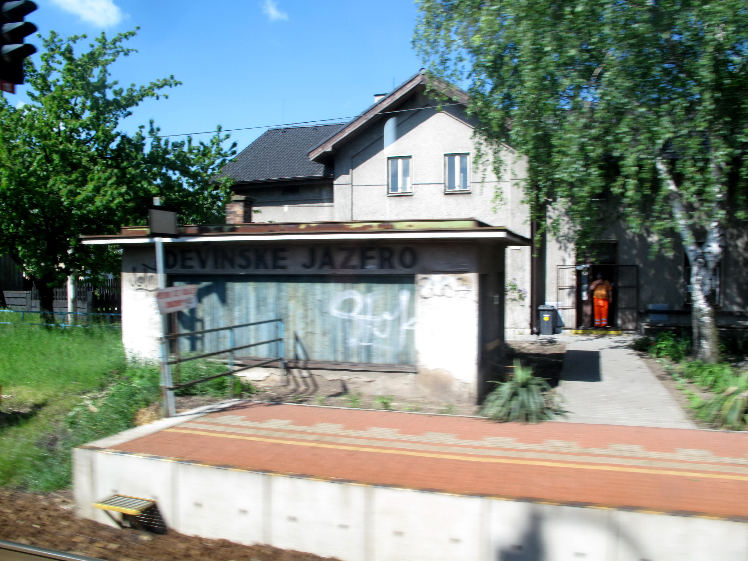 Devínske Jazero, železniční stanice